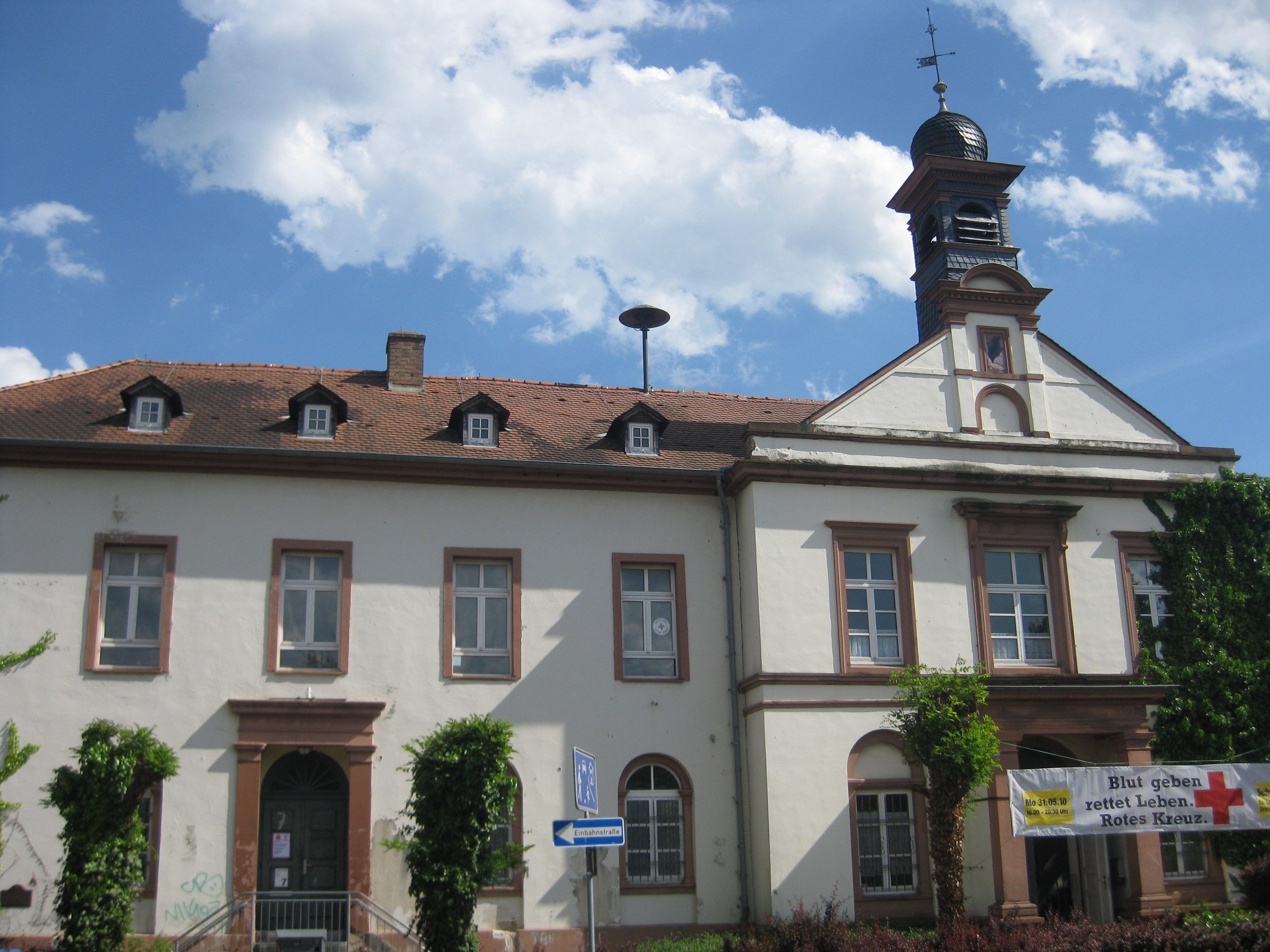 Das Alte Schulgebäude in Schwalbach am Taunus